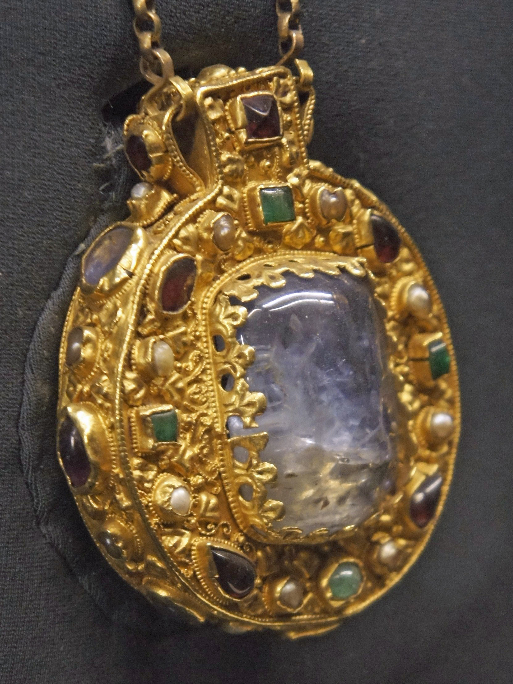 Talisman de Charlemagne, bijou du IX e siècle, double face, pendantif en or repoussé avec filigranes et granulations.